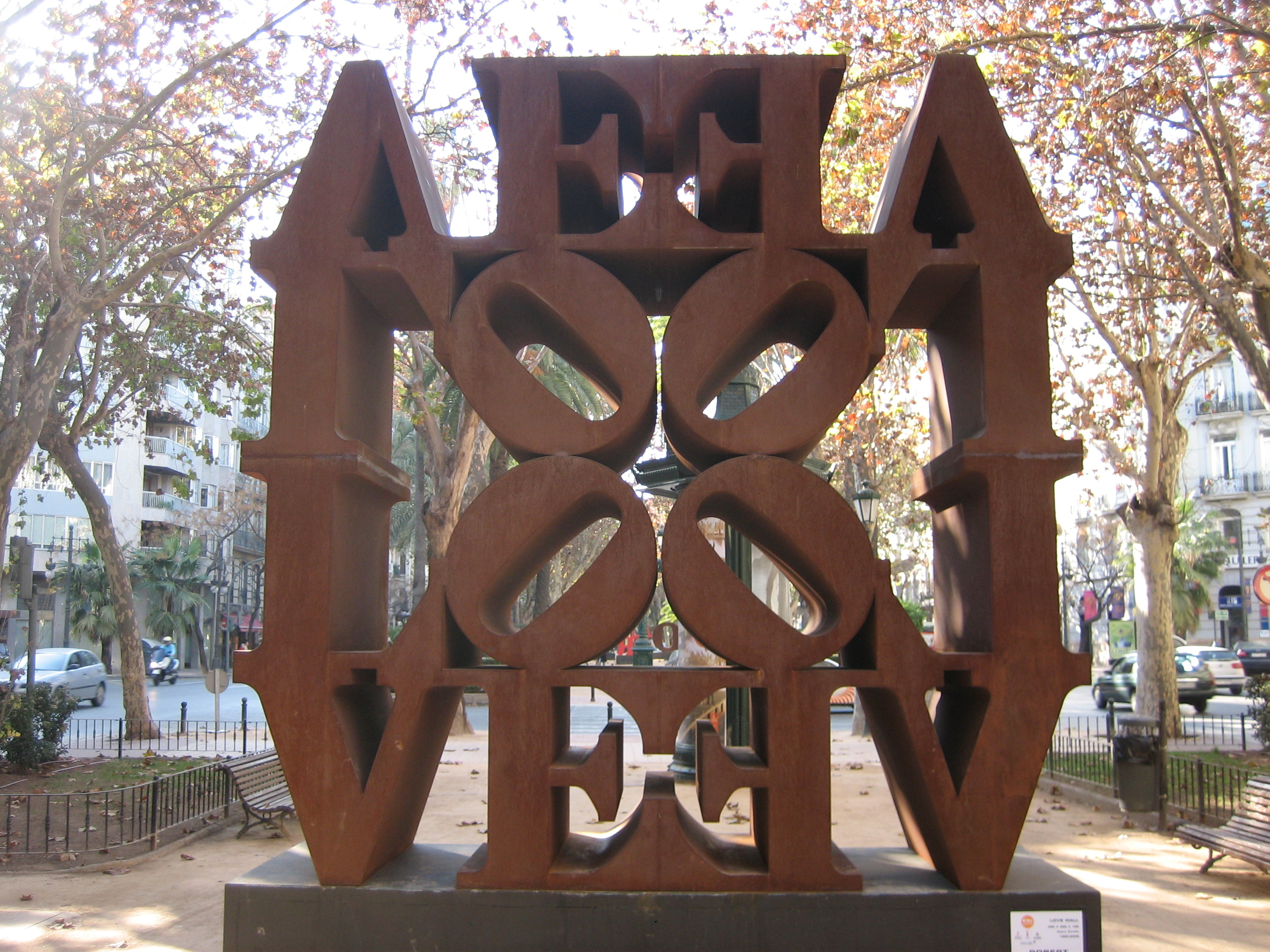 Robert Indiana. "Por amor al arte". Valencia, 8 enero 2007 - 25 febrero 2007.